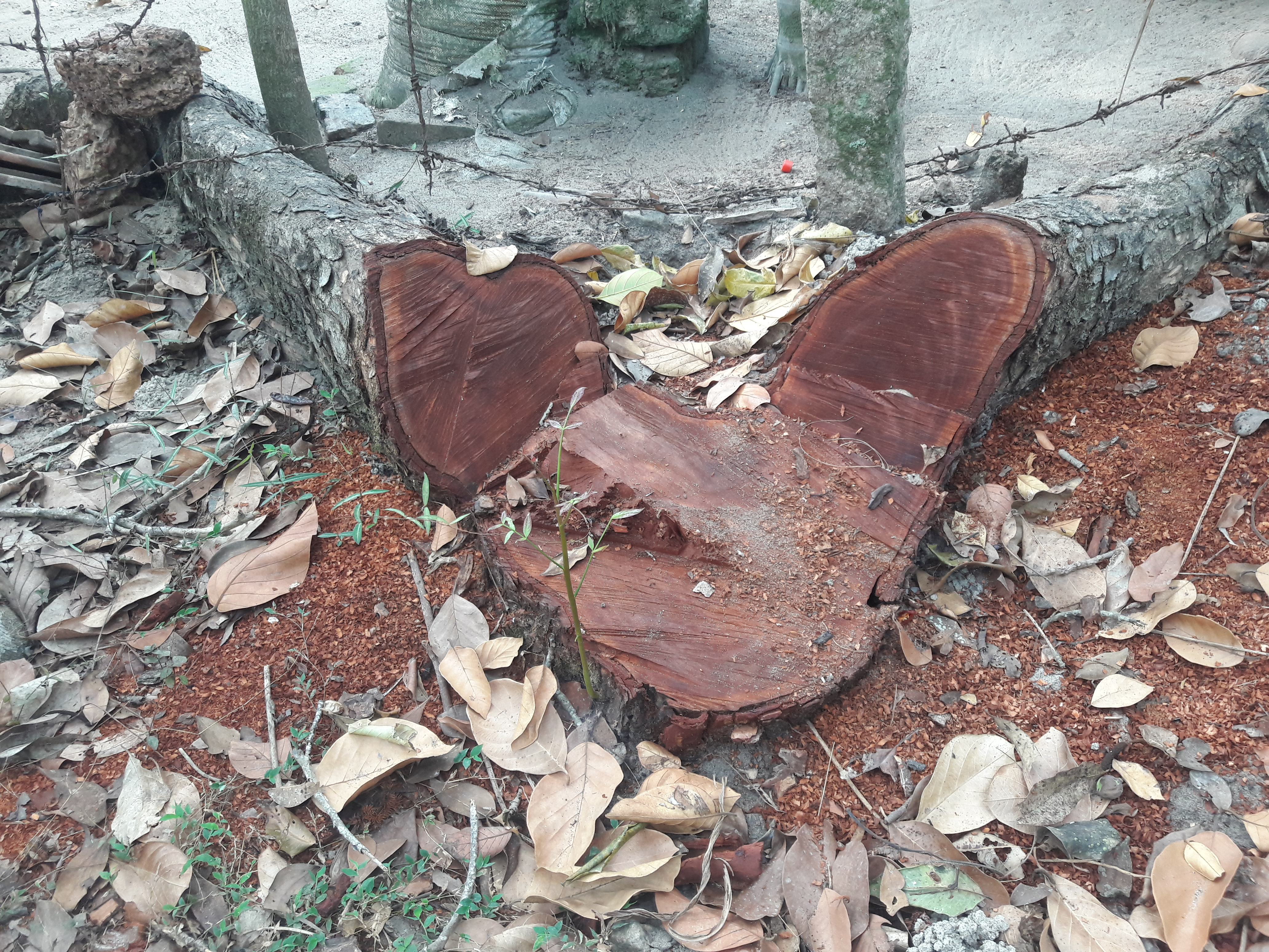 വിളവെടുപ്പ് കഴിഞ്ഞ ഒരു മഹാഗണി. Mahogany tree ശാസ്ത്രീയ നാമം Swietenia macrophylla കുടുംബം Meliaceae.